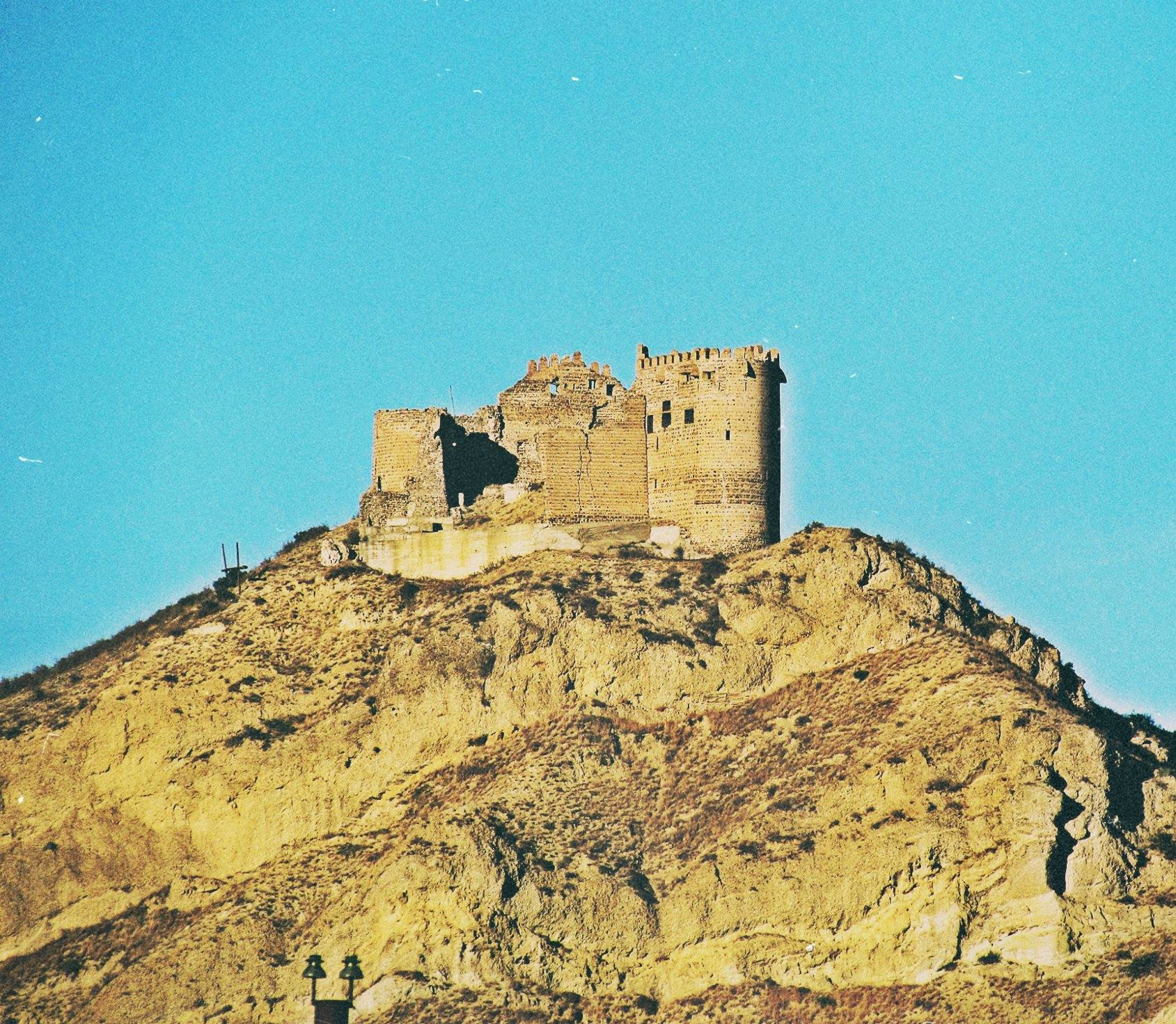 ქსნის ციხე